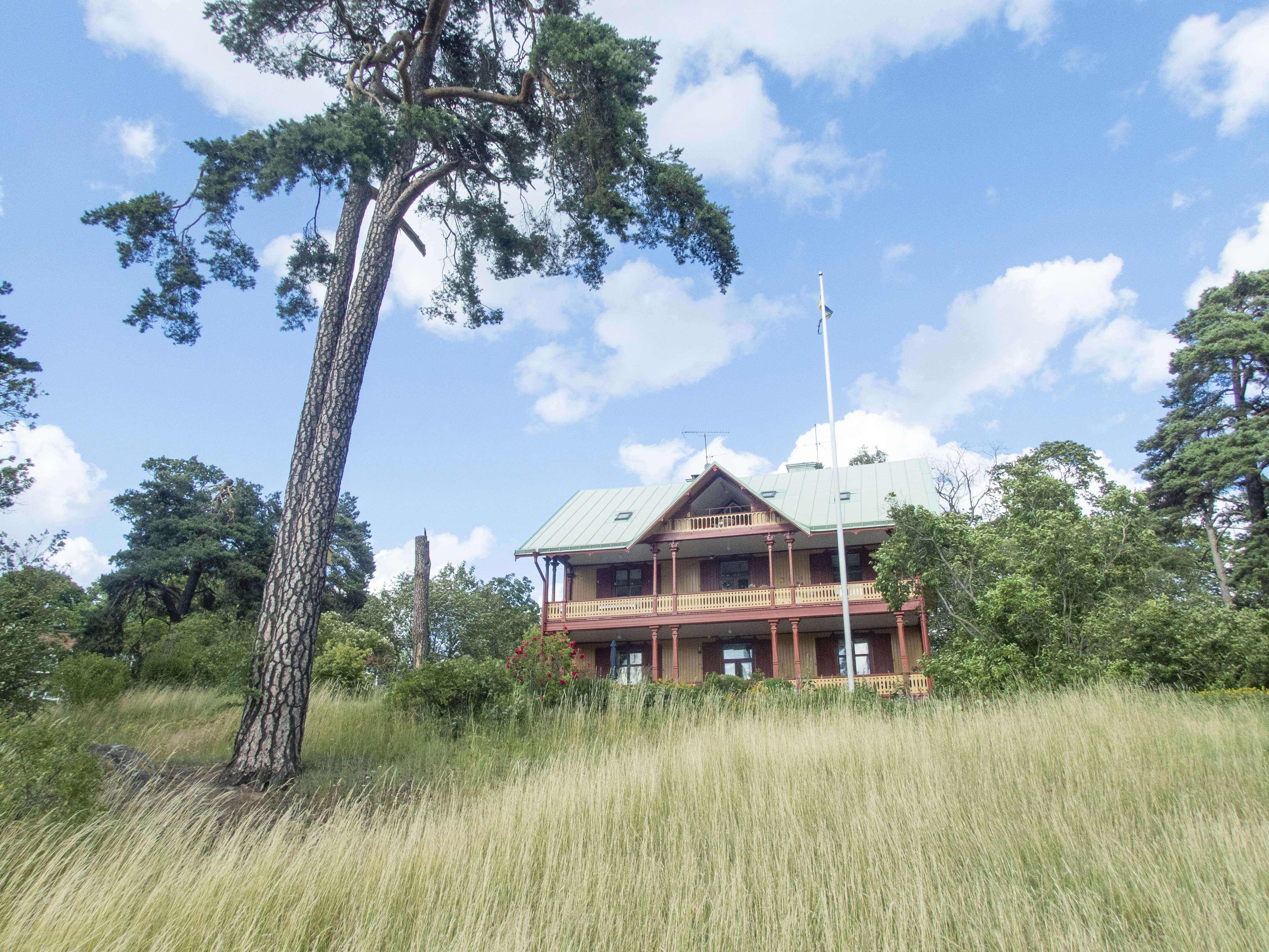 Kräftriket. Roslagsvägen 91. Villa byggd på 1880-talet